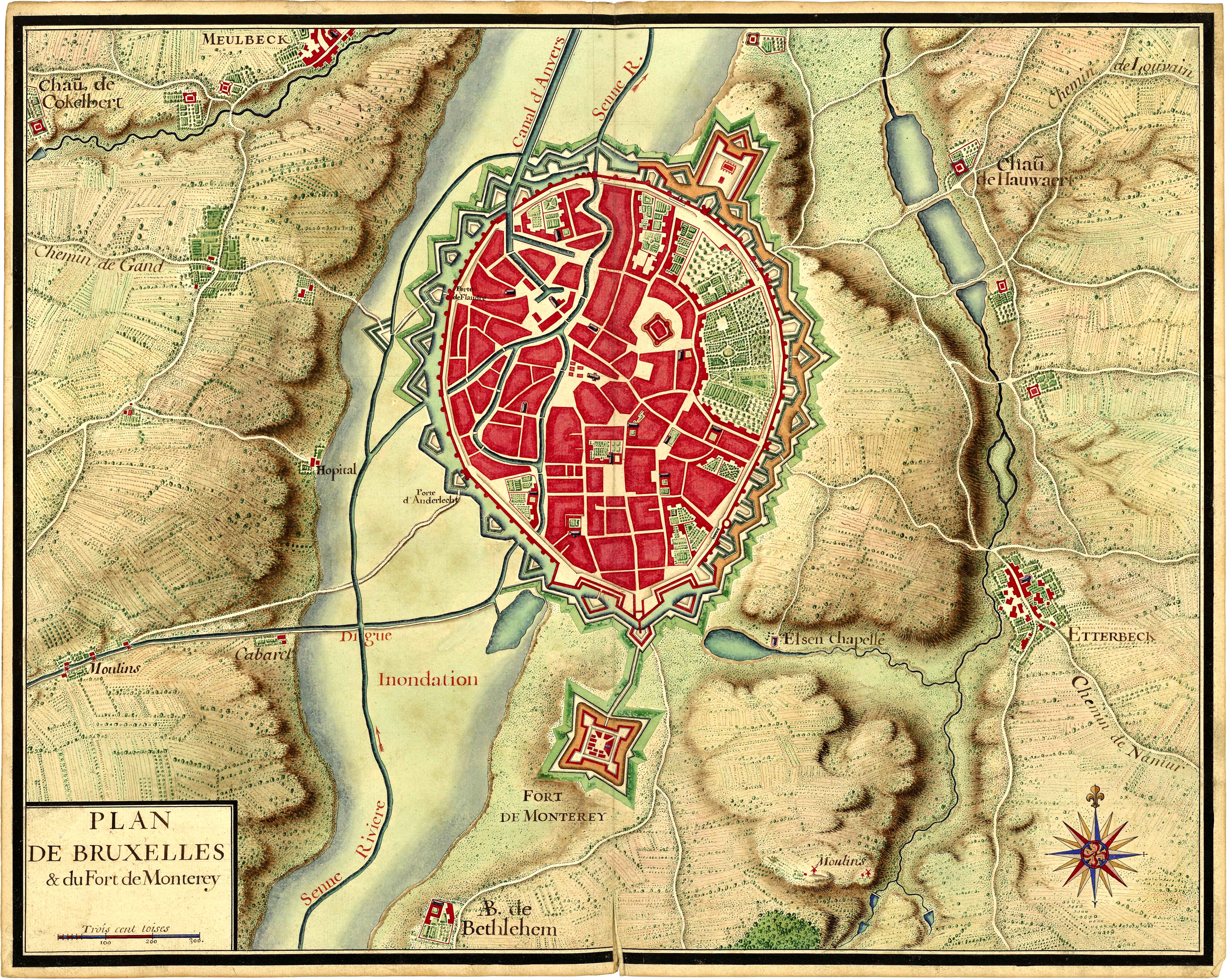 Plan de Bruxelles provenant de la collection de cartes réunies pour Louis XIV lors de la guerre de succession d'Espagne (1701-1714). Extrait du Recueil de cartes des environs de plusieurs places et de parties de France, des Pays-Bas espagnols et hollandois, d'Allemagne, d'Autriche et d'Italie.